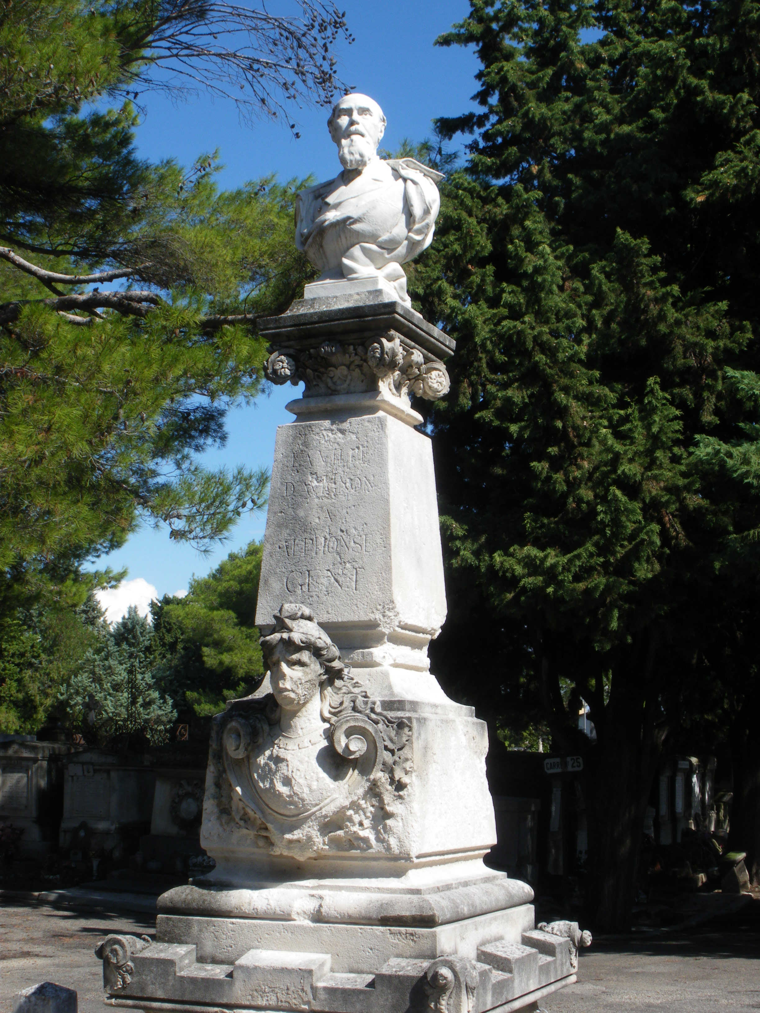 Statue d'Alphonse Gent sculptée par Louis Cosme Demaille, au Cimetière de Saint Véran d'Avignon